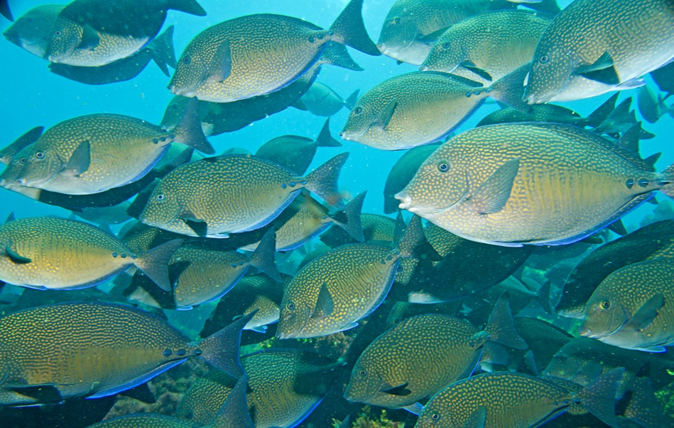 Banco de Prionurus maculatus en isla Howe